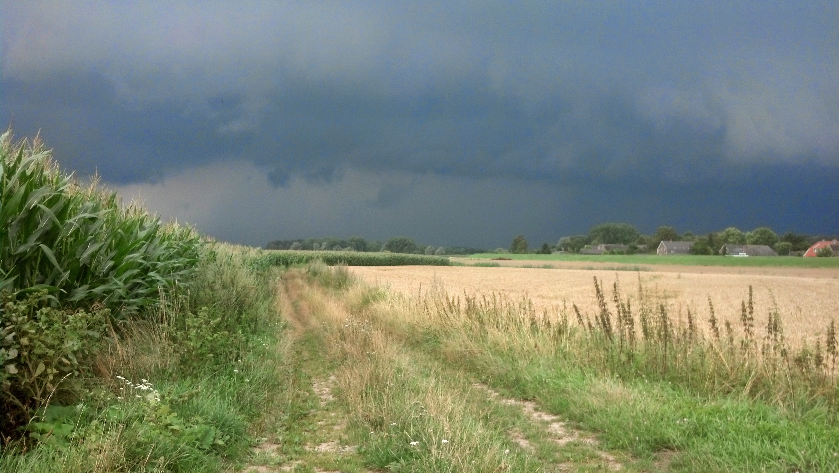 Wilpse Kleipolder